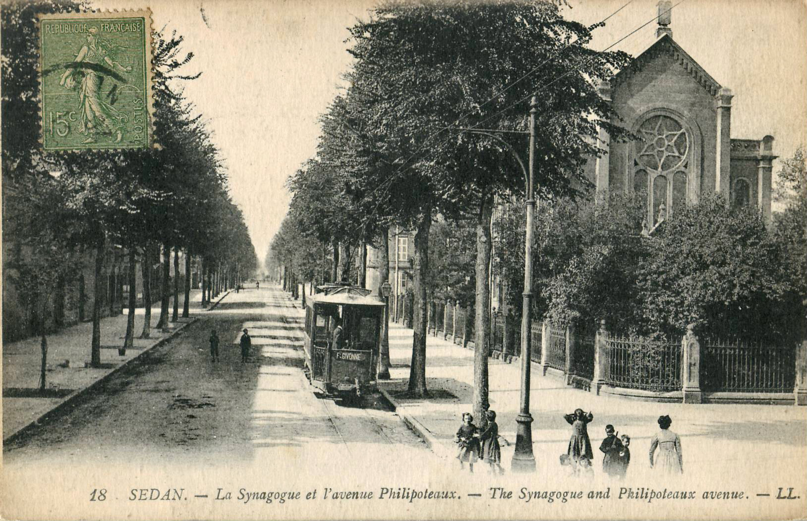 Carte postale ancienne éditée par LL, n°18 : SEDAN : La synagogue et l'avenue Philipoteaux